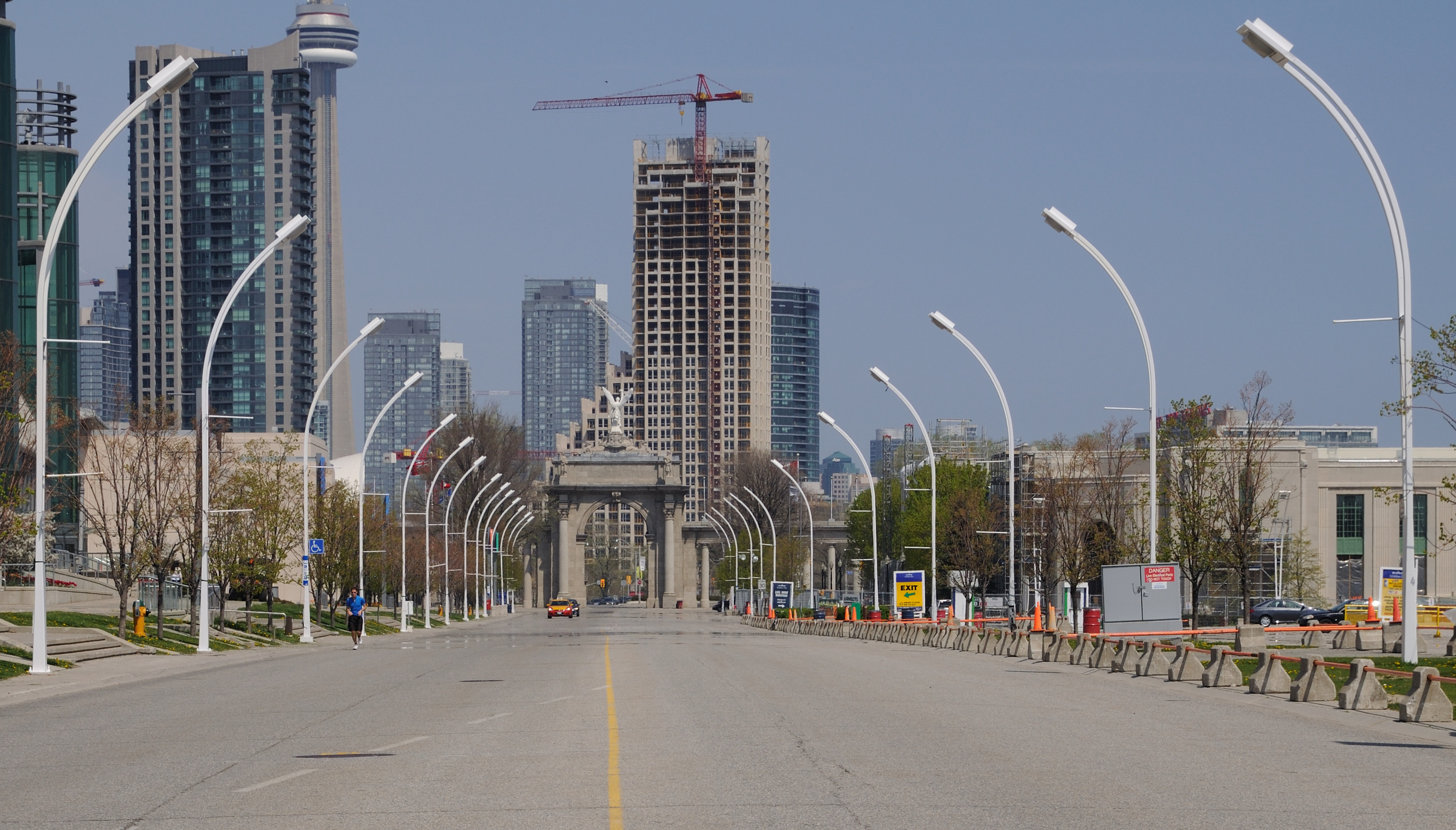 Toronto: Princes' Gates, das Eingangstor des Exhibition Place